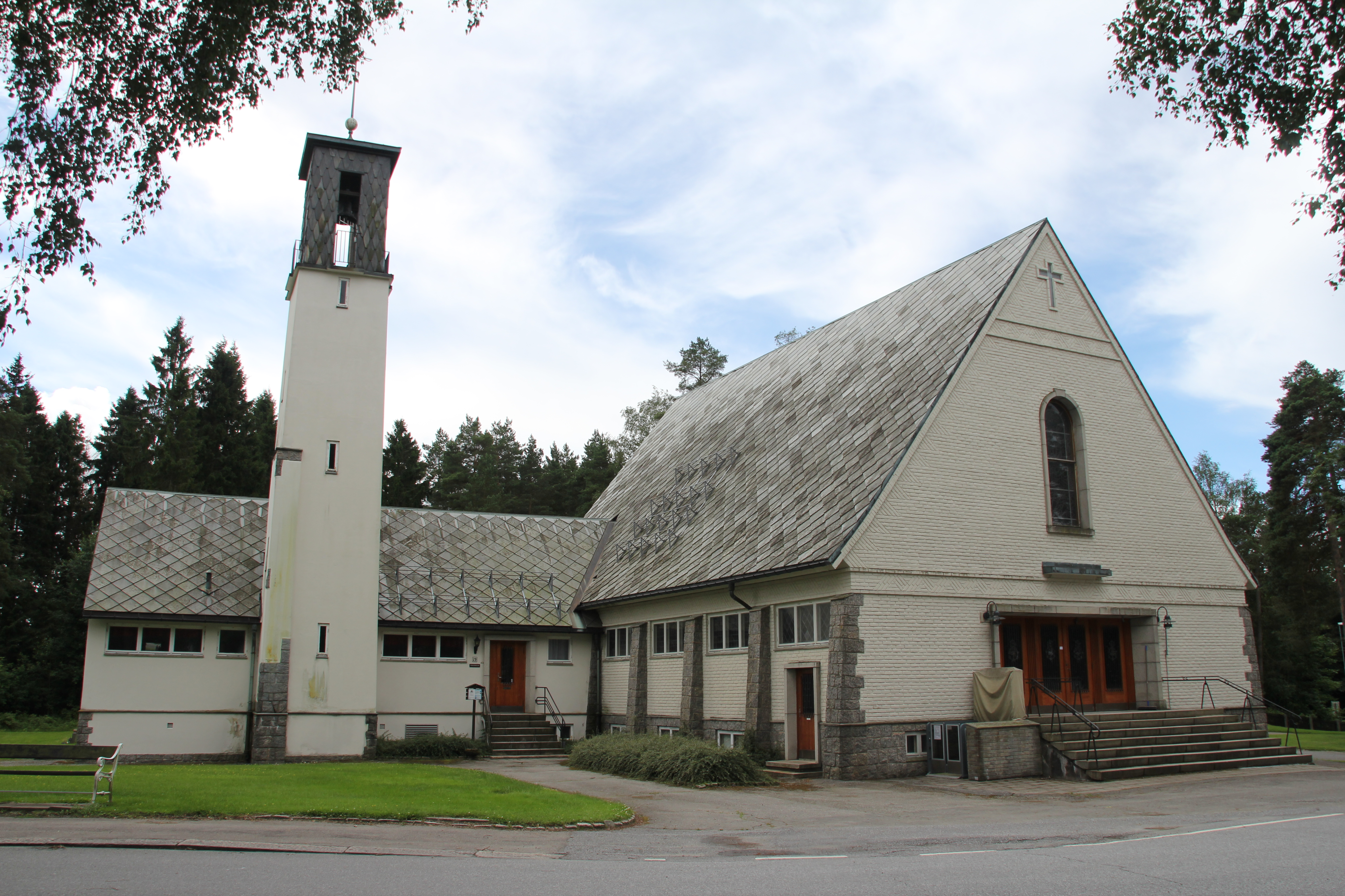 Askim kapell ble innviet 1.mars 1957.